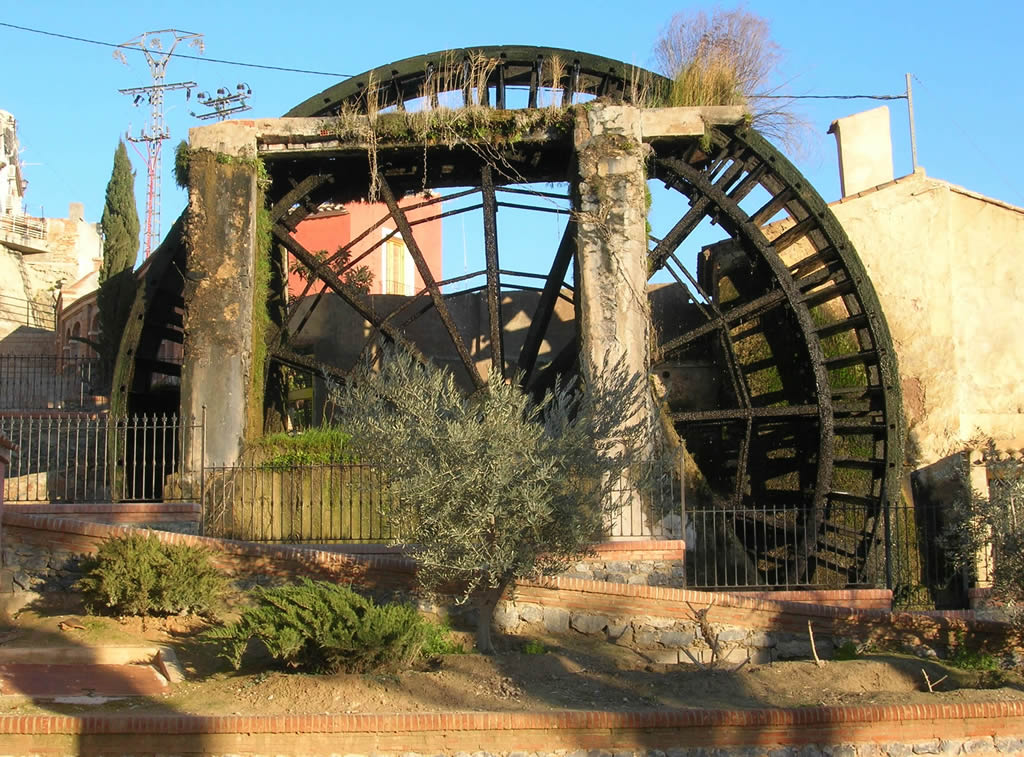 Abarán - Noria grande Noria grande ("ñora grande") de Abarán, Murcia, España. Great waterwheel from Abarán, Murcia, Spain. Own picture given to PD.